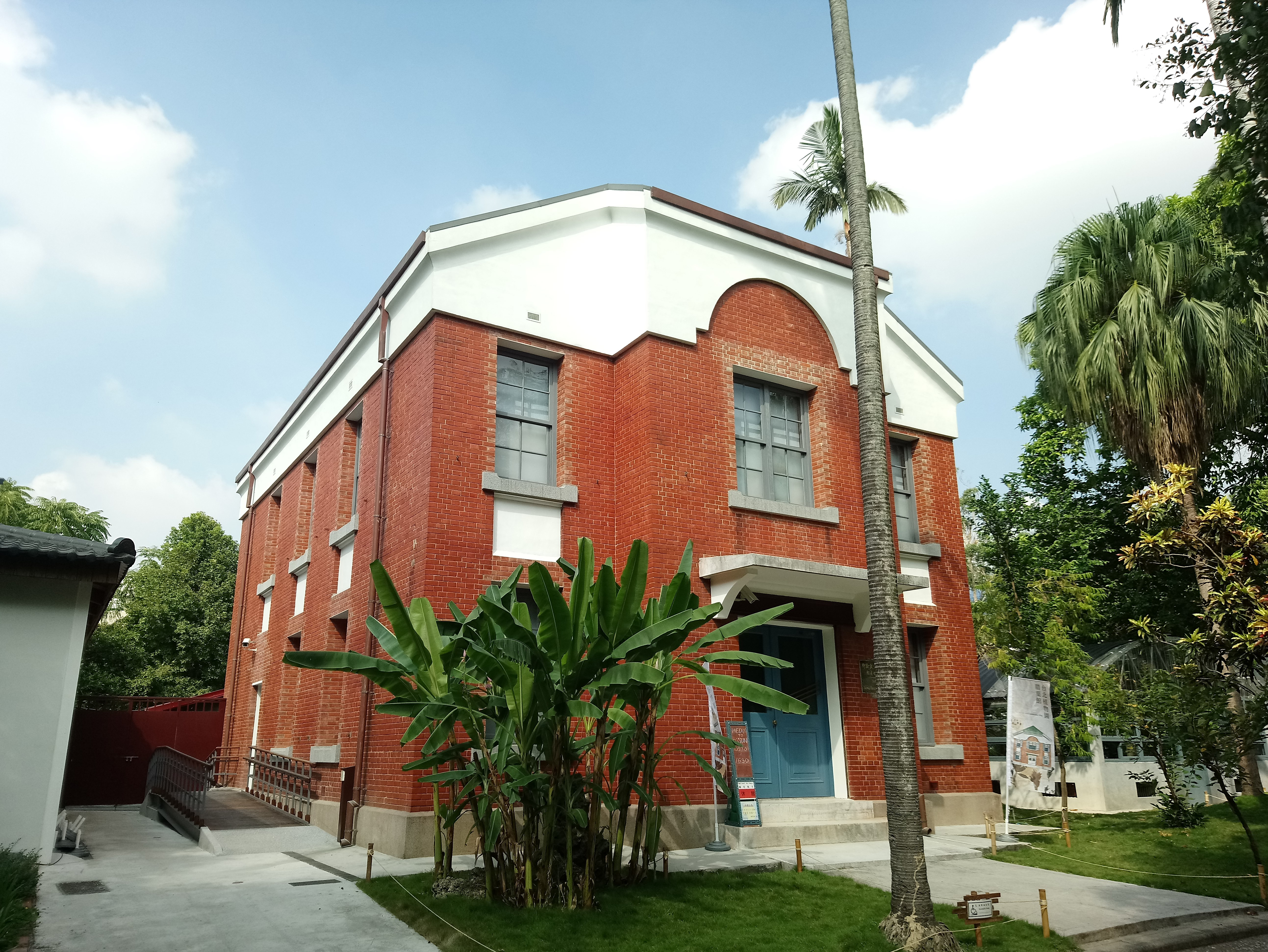 植物園腊葉館,臺北市中正區南門次分區南門里